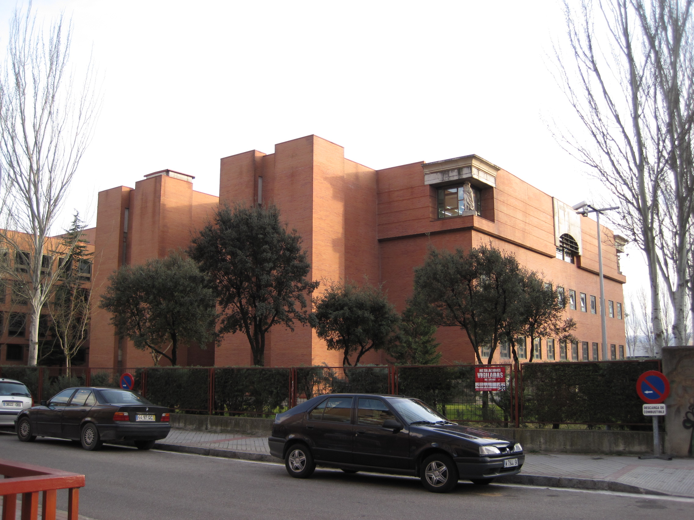 Edificio de la Escuela Técnica Superior de Arquitectura de Valladolid (España).